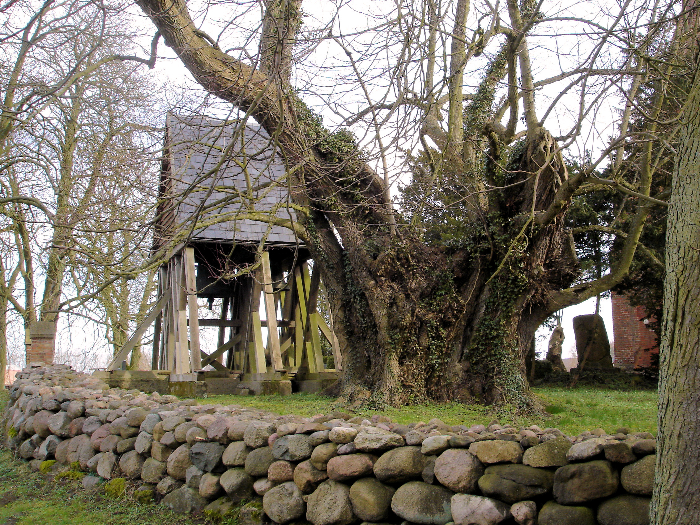 Kirche Walkendorf / Church in Walkendorf